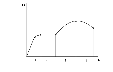 Diagrama de esfuerzo - deformación. este diagrama esta dado mediante la maquina universal de esfuerzo deformacion; que nos arroga datos muy precisos de lo que le ocurre al material en el preciso instante que es sometido a na carga axial. fxc . . bta .